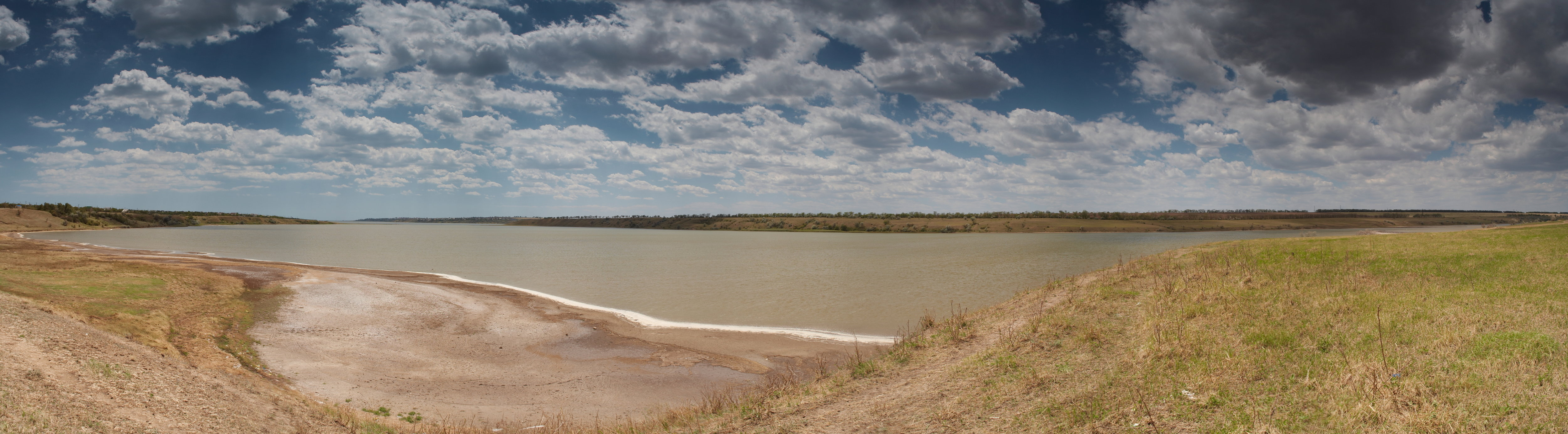 Панорама Аджалыкского лимана (7 вертикальных снимков)Панорамный снимок с применением эффектных фильтров Cokin P160 и P120 (Canon EOS 350D/Tamron SP 20-40 2.7/3.5)